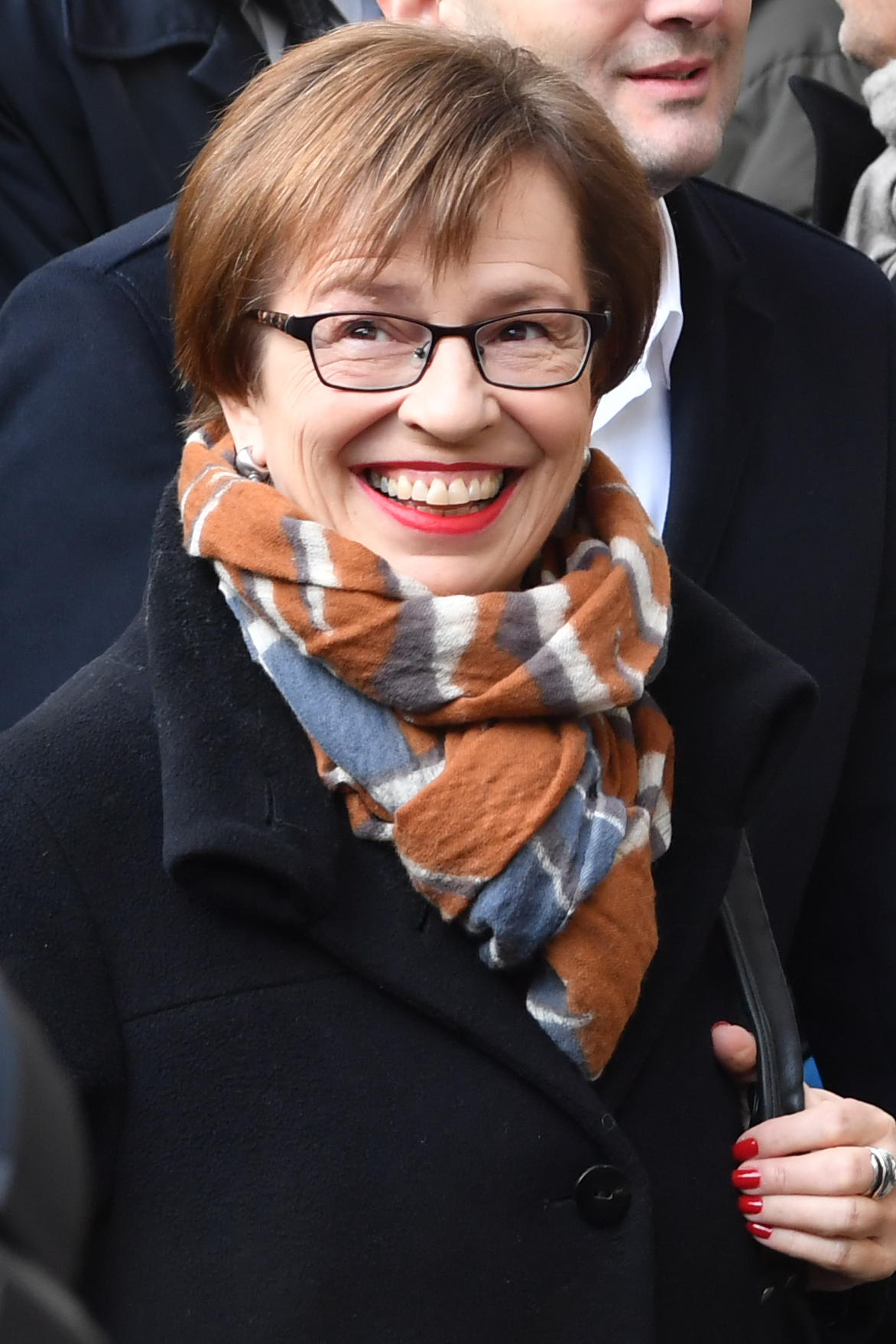 Wahl zum österreichischen Bundespräsidenten am 4. Dezember 2016. Bild zeigt Doris Schmidauer bei der Stimmabgabe.